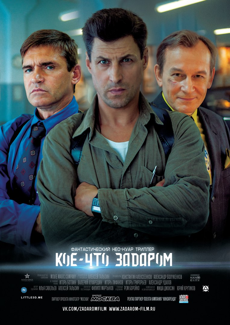 Художественный фильм.